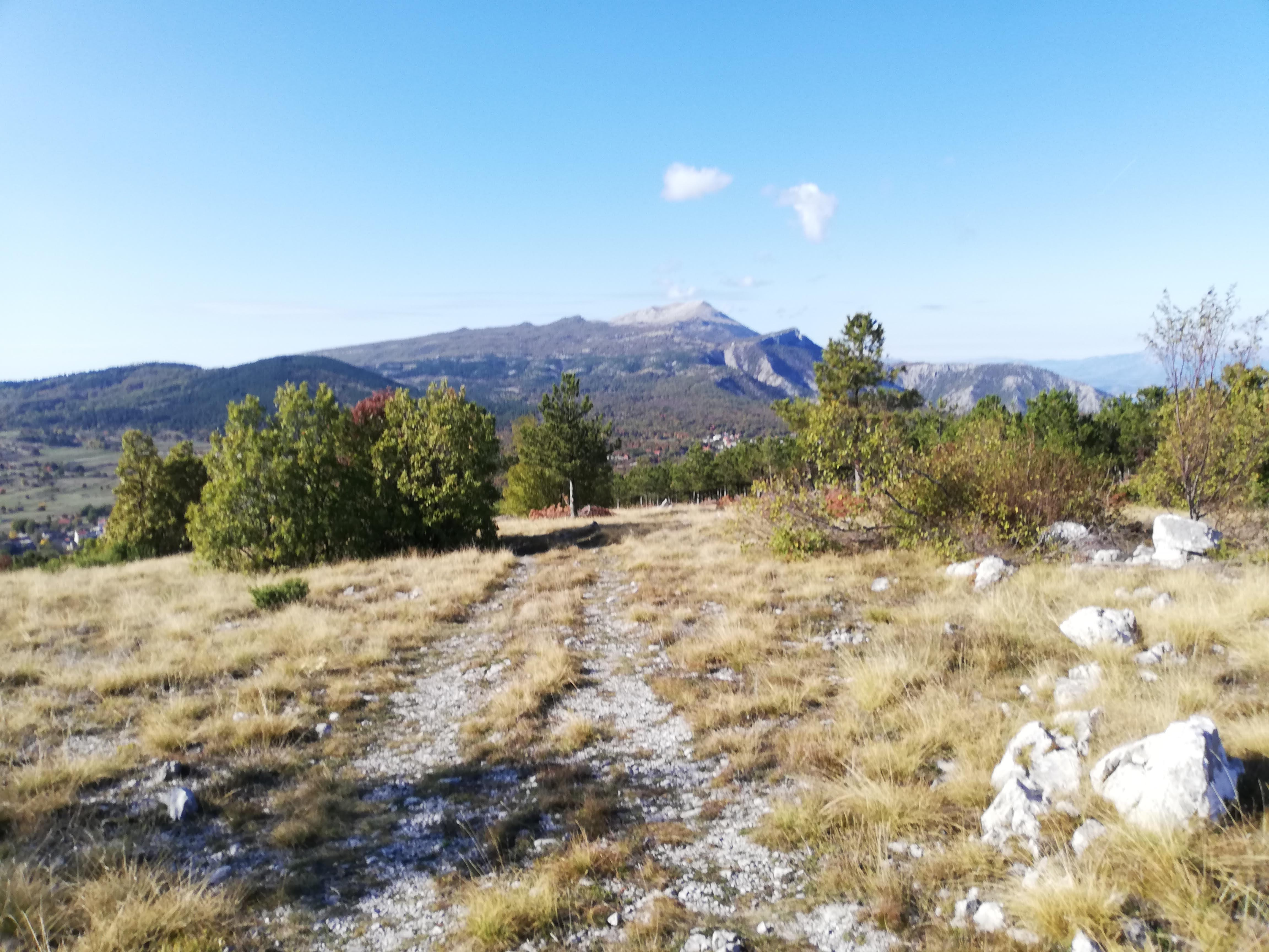 Blick auf den Svilaja Gipfel aus Zelovo